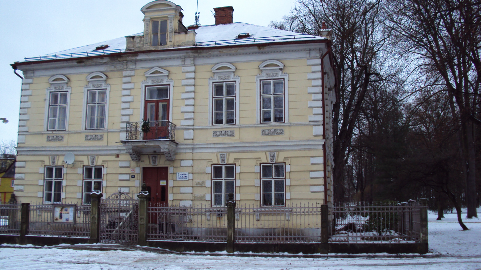 Budova Farního úřadu Církve Československé husitské v České Lípě poblíž Střelnice